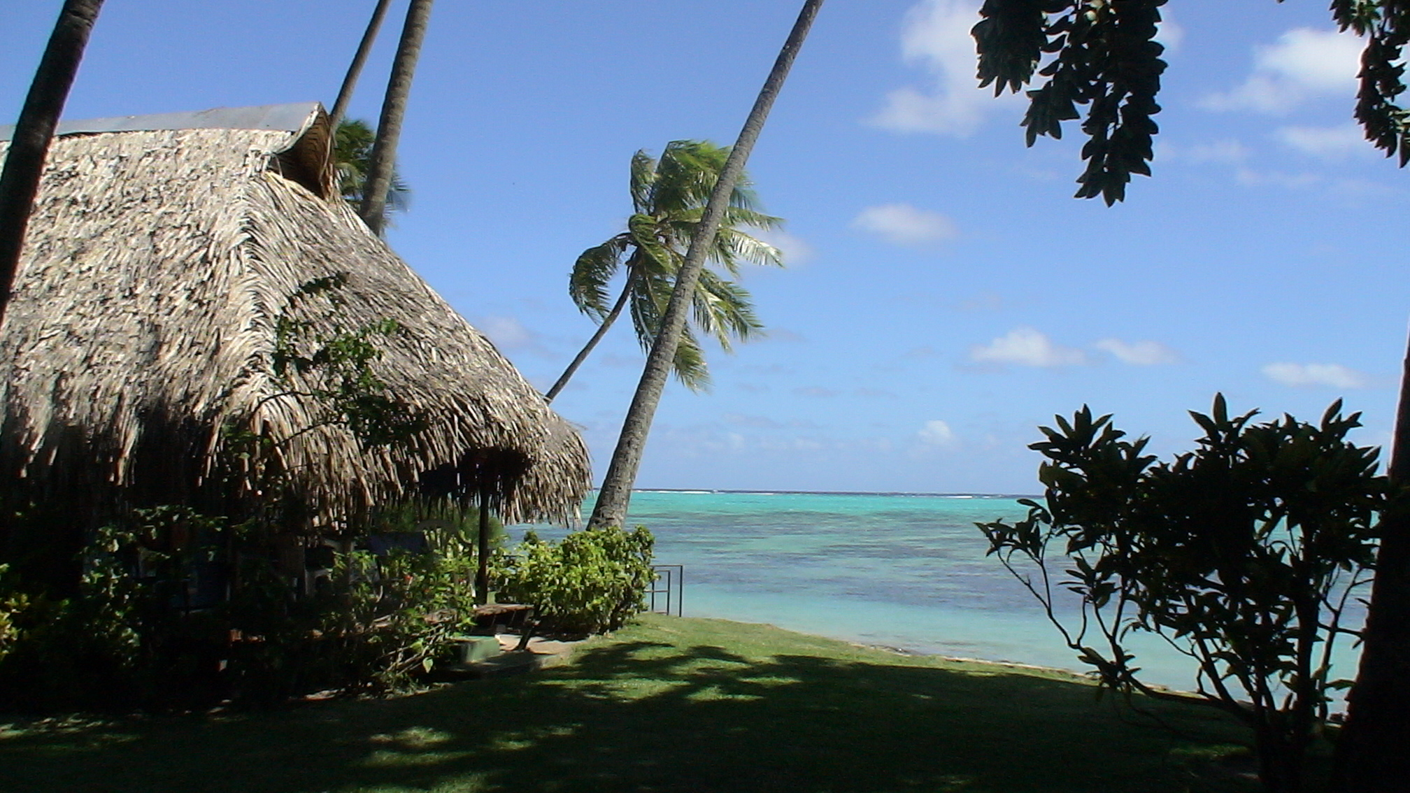 Blick vom Hotel Hibiscus (Hauru Point) auf Lagune, Moorea, Gesellschaftsinseln